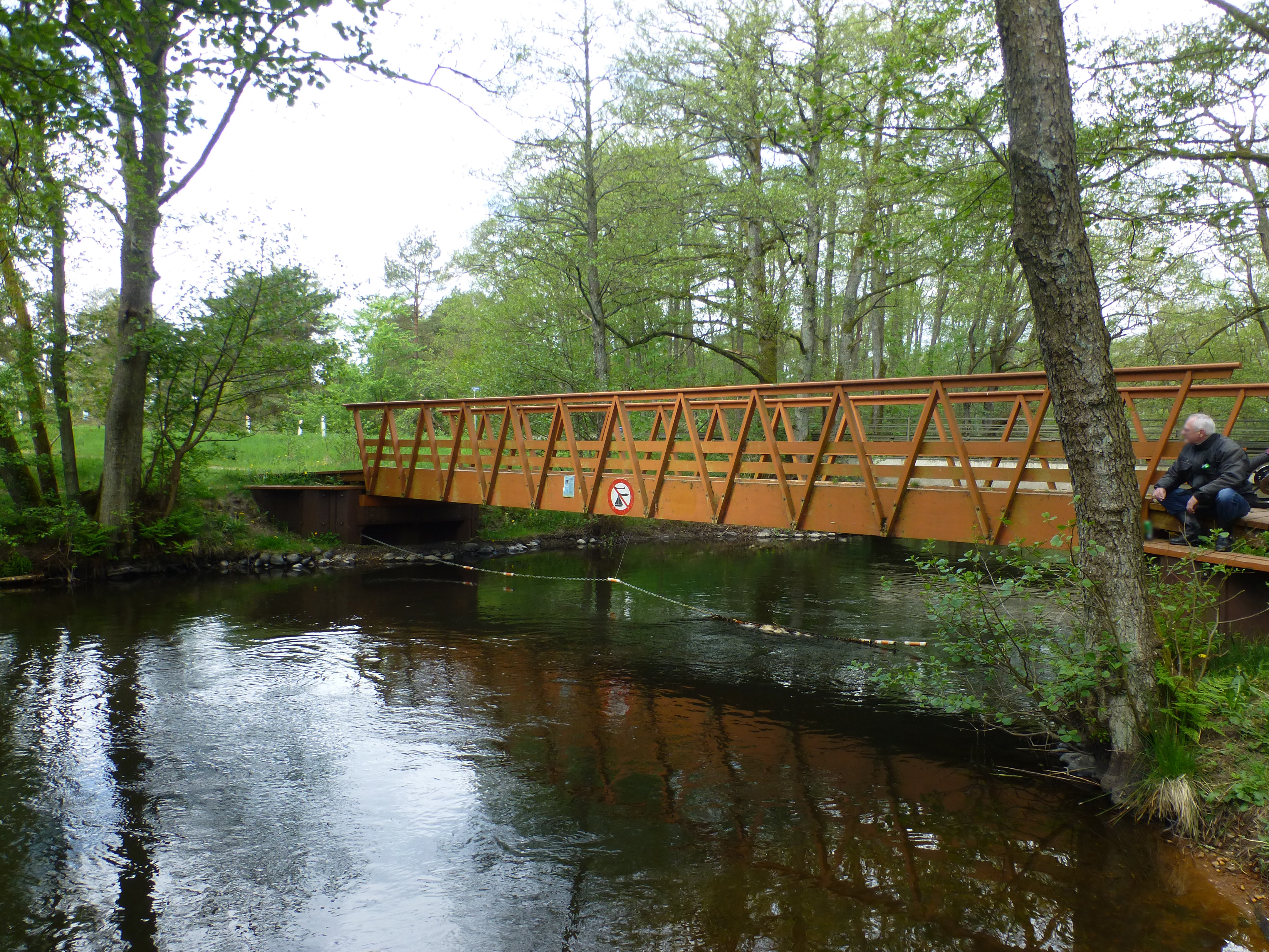 Salten Å ved Rye Bro